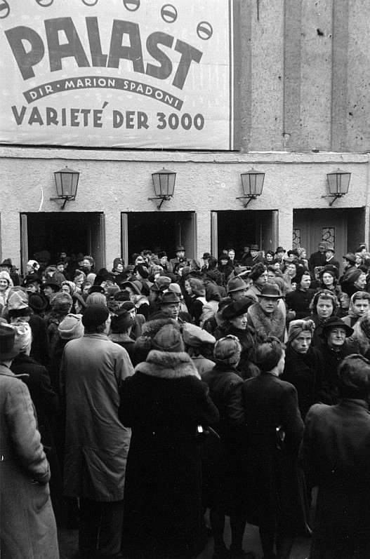 Original image description from the Deutsche FotothekGreta Kuckhoff, Haber (München), Dr. Barbara v. Renthe (Berlin)